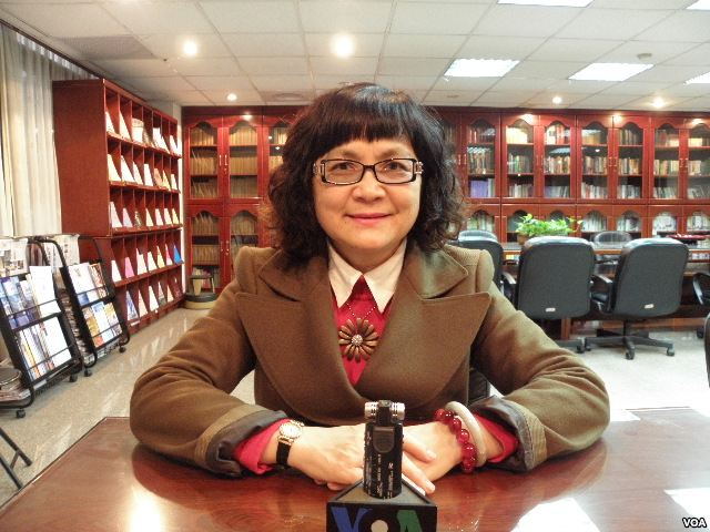 台北地方法院刑事庭审判长洪英花。